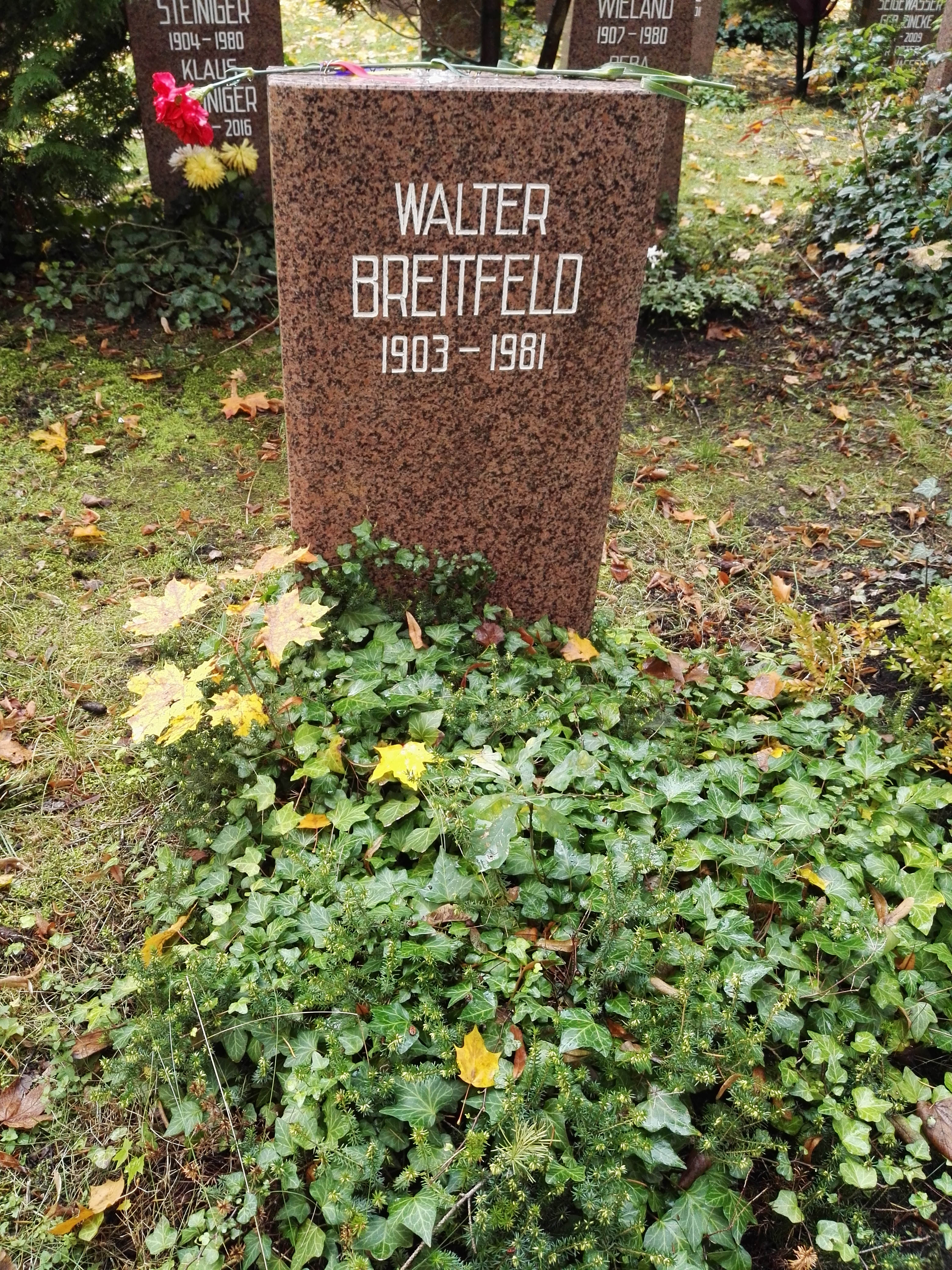 Grab von Walter Breitfeld auf dem Sozialistenfriedhof des Zentralfriedhofs Friedrichsfelde